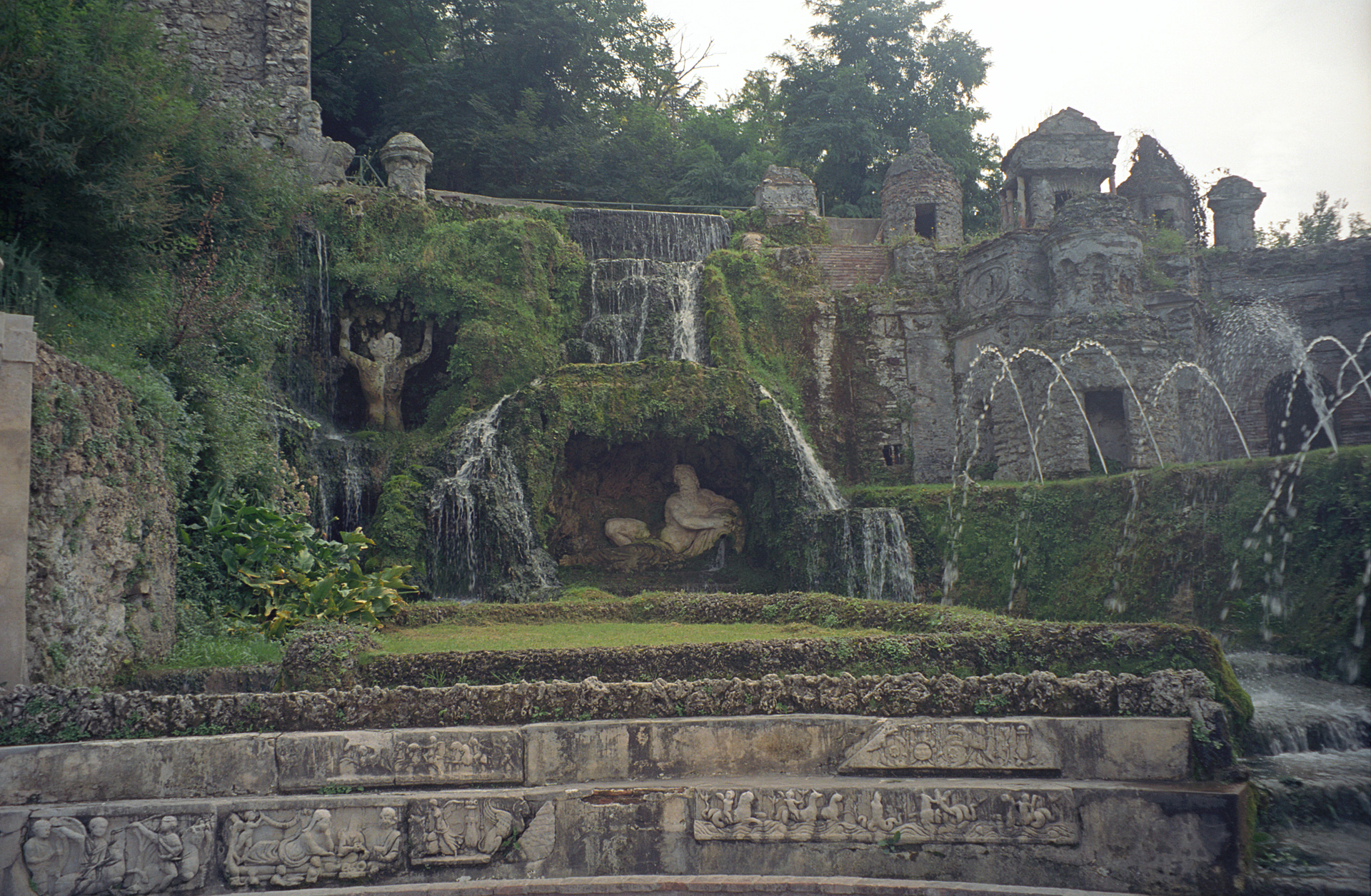 Villa d'Este, Tivoli - Allegoria del fiume Aniene che si congiunge al Tevere sotto la Rometta.